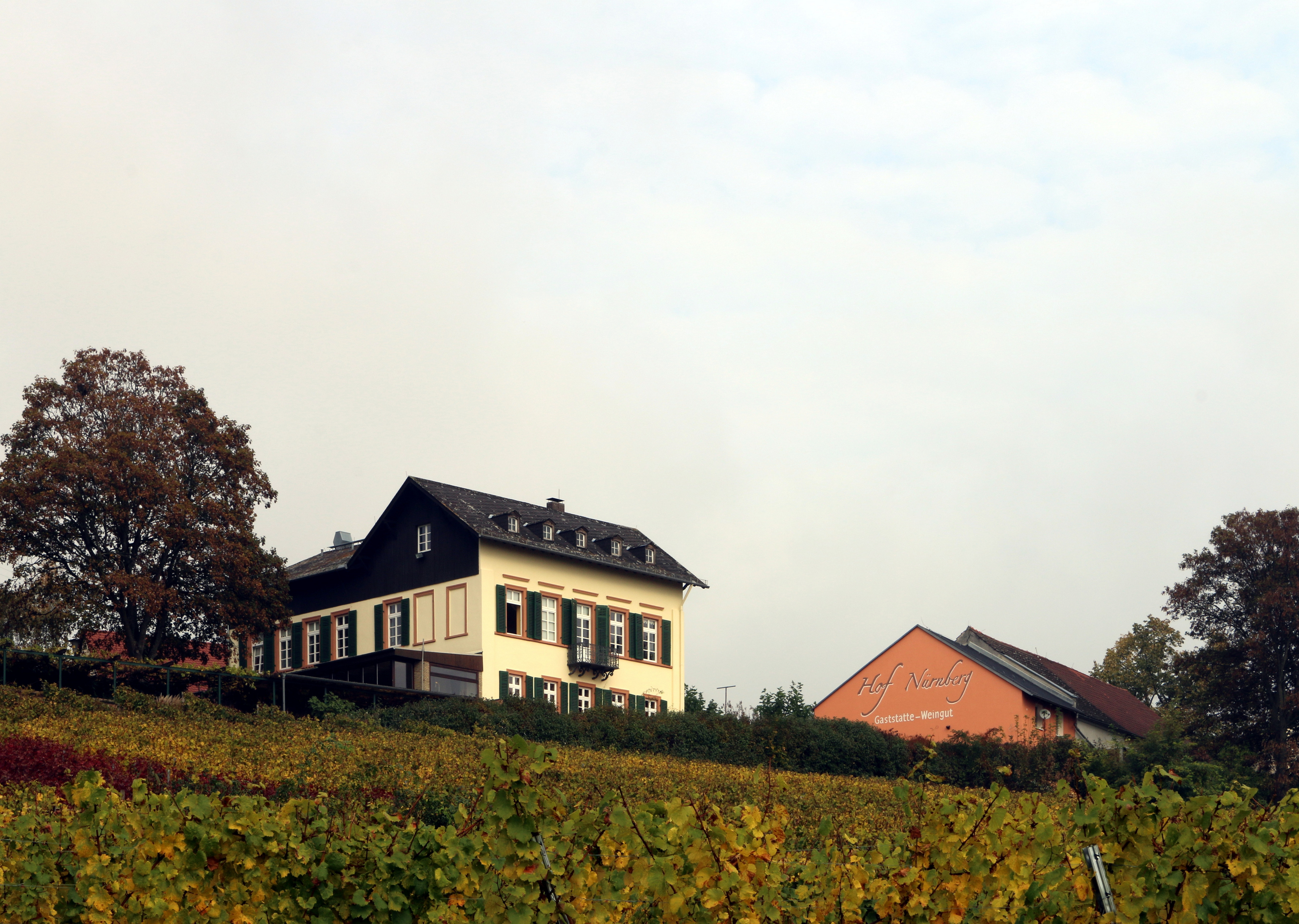 Wiesbaden: Blick auf den Nürnberger Hof bei Frauenstein. Befestigter Hof aus dem 13. Jahrhundert, mehrfach aus- und umgebaut